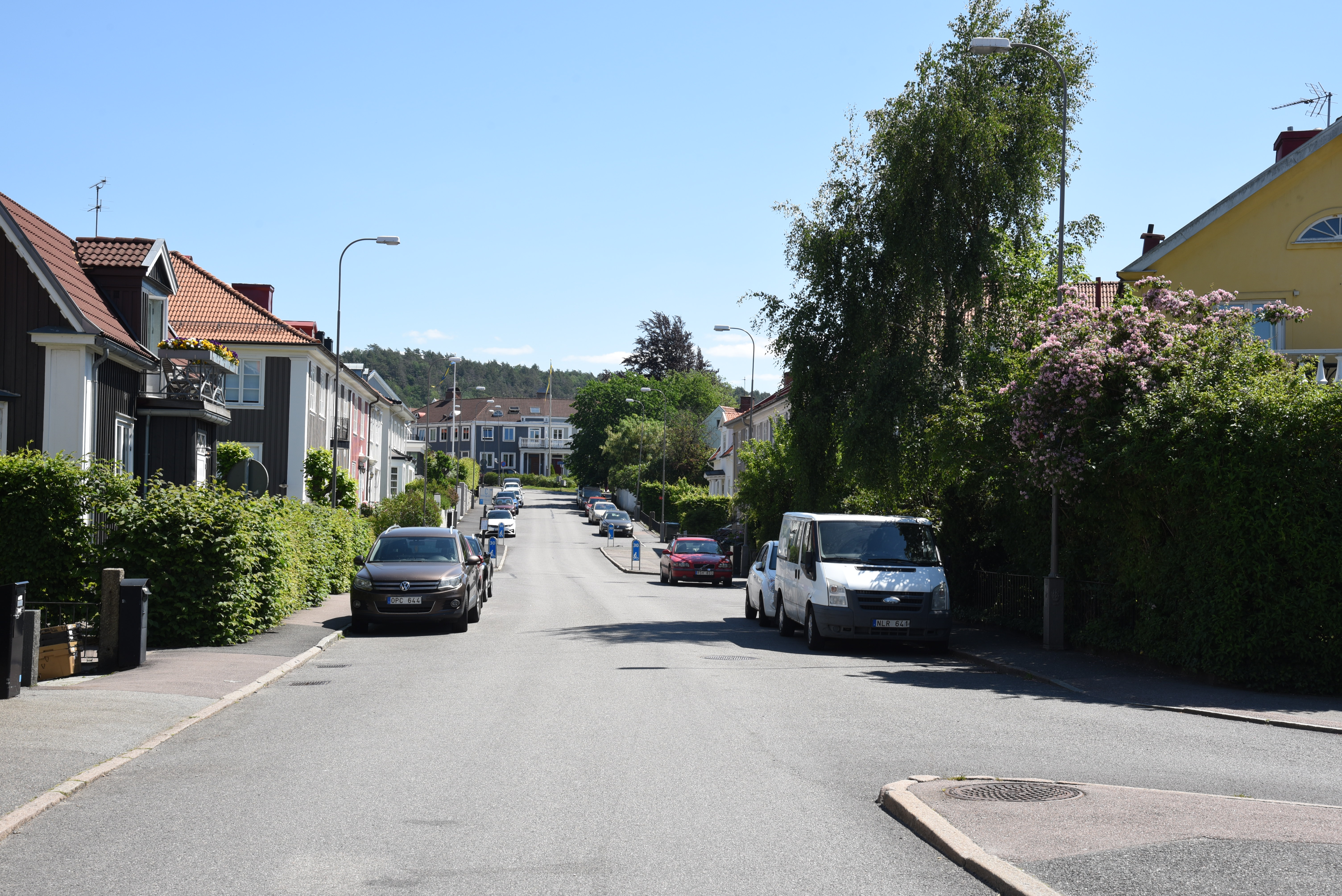 Olof Skötkonungsgatan i stadsdelen Bö i Göteborg.